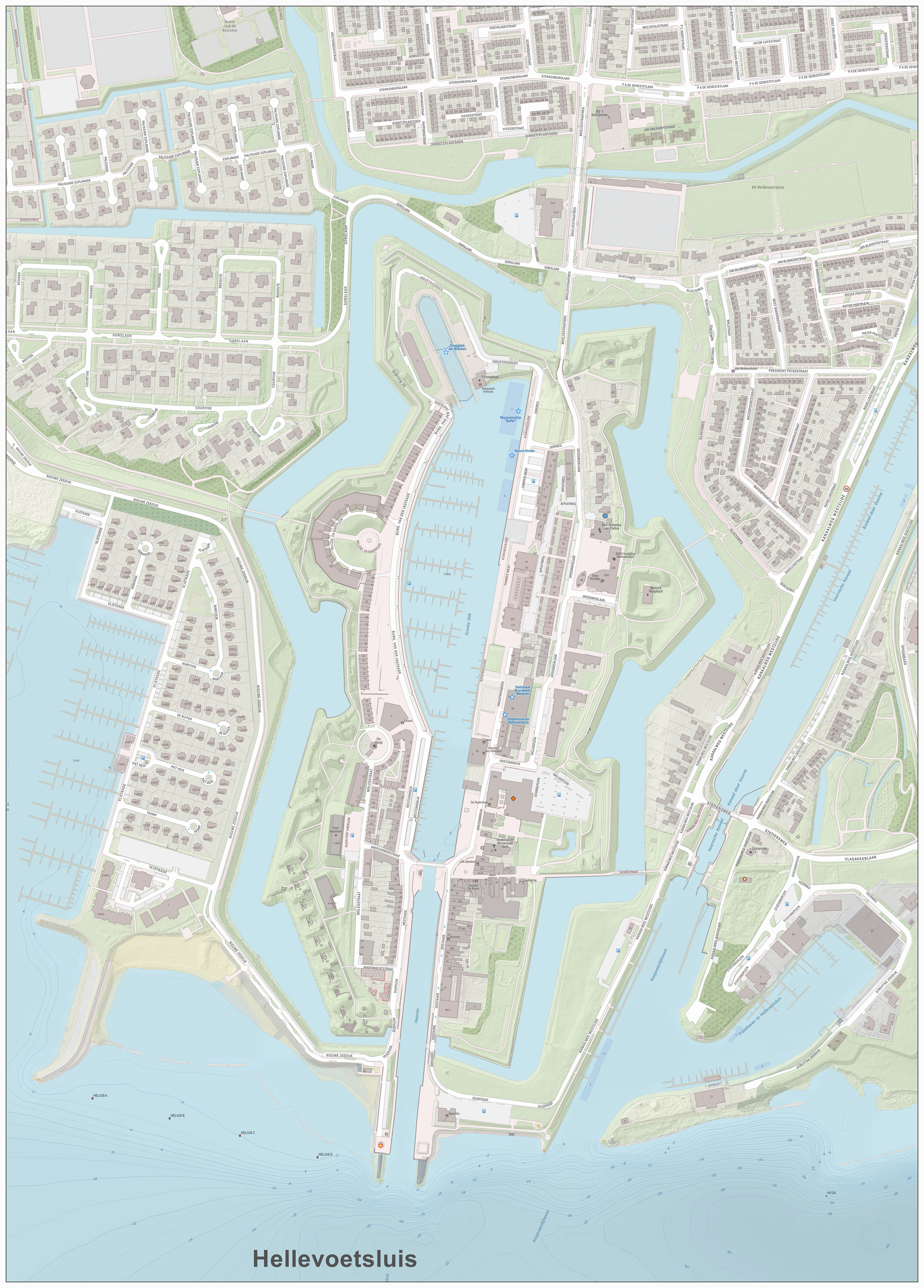 Topografische kaart van Hellevoetsluis (centrum van woonplaats). Resolutie: 2688 pixels/km. Kaartbeeld samengesteld uit de open geodata van de Basisregistratie Grootschalige Topografie (BGT), Creative Commons-BY Kadaster, en Top10NL en Top25namen (Basisregistratie Topografie, Kadaster), Creative Commons-BY Kadaster. Gebouwvlakken uit open geodata BAG extract, Creative Commons-BY Kadaster. Wegen uit de OpenStreetMap, CC-BY OpenStreetMap bijdragers. Reliëfschaduw uit de Actuele Hoogtekaart AHN2/AHN3. Samenstelling en kleurenschema: Jan-Willem van Aalst, met QGIS2. Zie ook de Legenda.